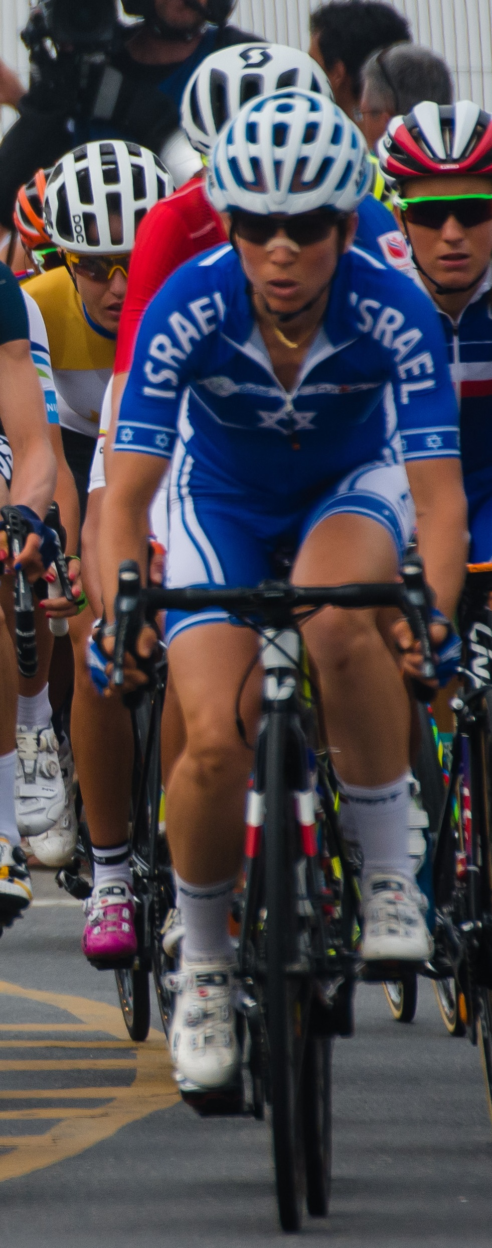 Passagem das ciclistas em frente à instalação olímpica do Pontal (Recreio, Rio de Janeiro). Prova disputada em 07/08/2016.